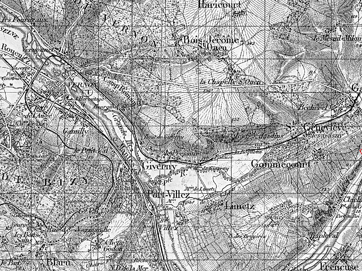 Le nœud ferroviaire de Vernon (Eure). Carte d’État-Major au 1/50.000 type 1889, feuilles au 1/50000 - 1889, 1907.